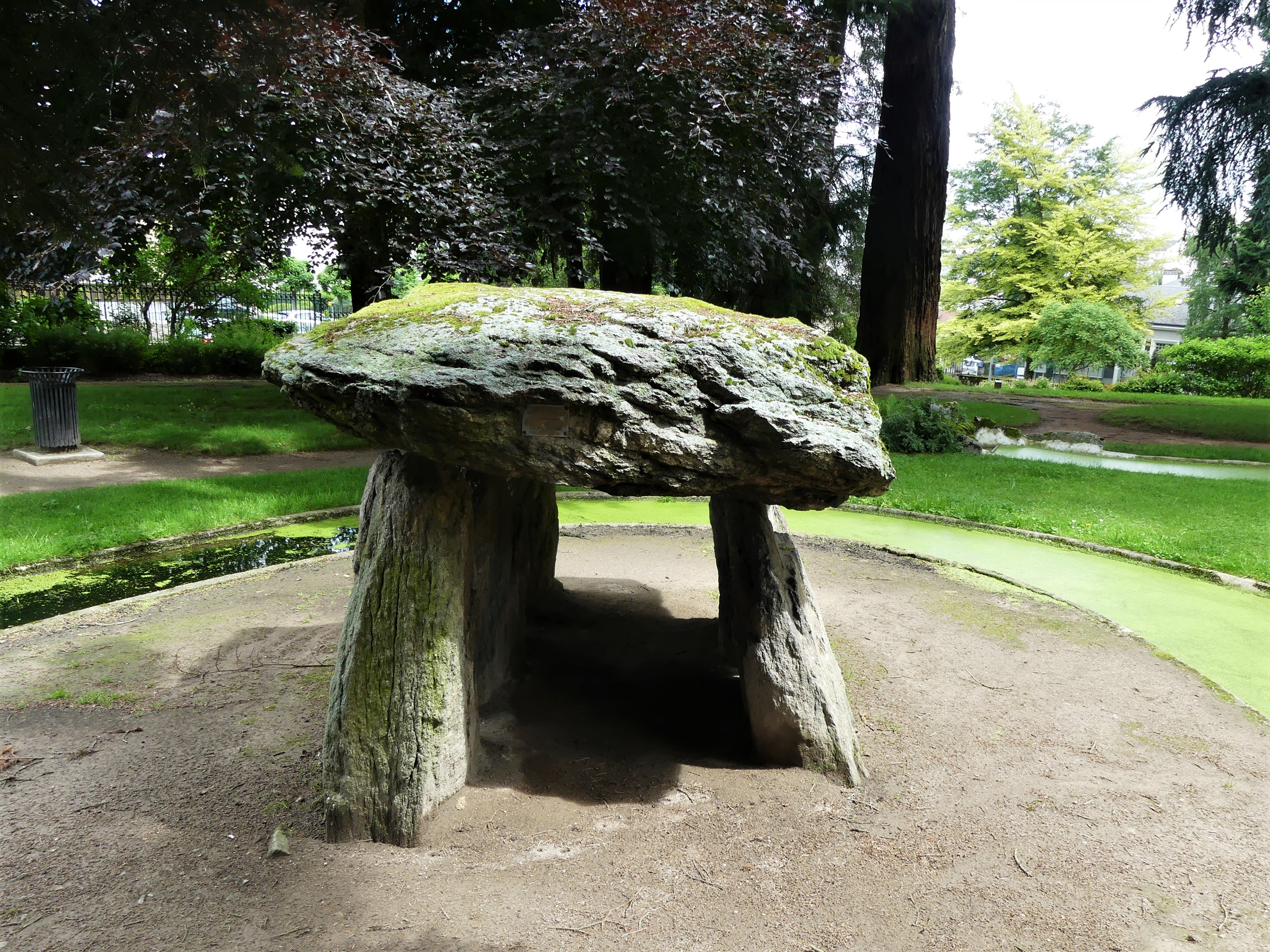 Le dolmen de la Chadrolle, parc de la Sénatorerie, Guérte, Creuse, France.